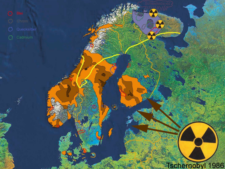 Umweltverschmutzung in Skandinavien